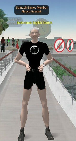 This picture represents me in the 3D Platform Second Life. I have taken a Screenshot and uploaded it so that Wikipedia can use it in the part "Avatar Funkyfunkie :)". Hereby, I declair it to be free of charge, and free to use for any purpose Wikipedia seems fit. Furthermore, I Decharge Wikipedia of ANY responsabilety regarding Copyright, since I uploaded the picture to be used by Wikipedia. To verify this, you can email me on the next adress: neovo.geesink(at)home.nl (Mail adress of me in Second Life)